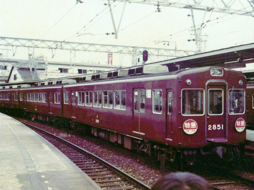 阪急2800系電車の特急時代の姿。